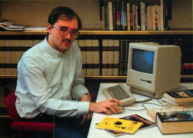 Silvio Sosio su Applicando del maggio 1986